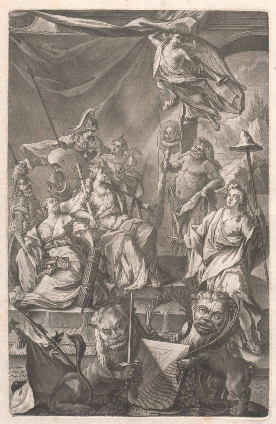 Sebastian Walch (Hrsg.): Portraits aller Herren Burger-Meistern, Der Vortrefflichen Republique, Stadt und Vor-Orths Zürich Von dem 1336ten biß auf das 1742te Jahr. Kempten 1756. Titelkupfer von Tobias Laub nach Gottfried Eichler. Siehe Erläuterung.